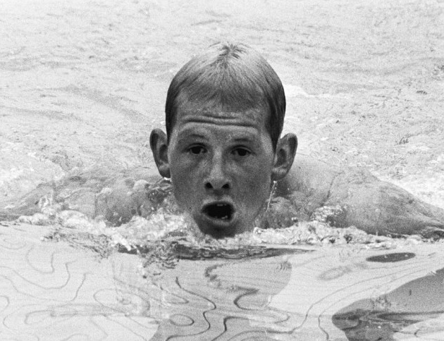 Ton van Klooster